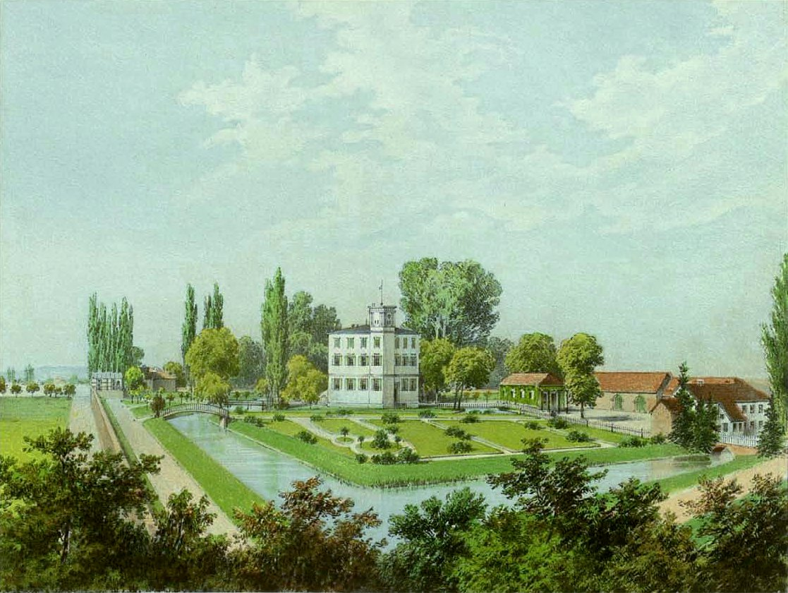 Rittergut Volkardey, Kreis Düsseldorf, Rheinprovinz